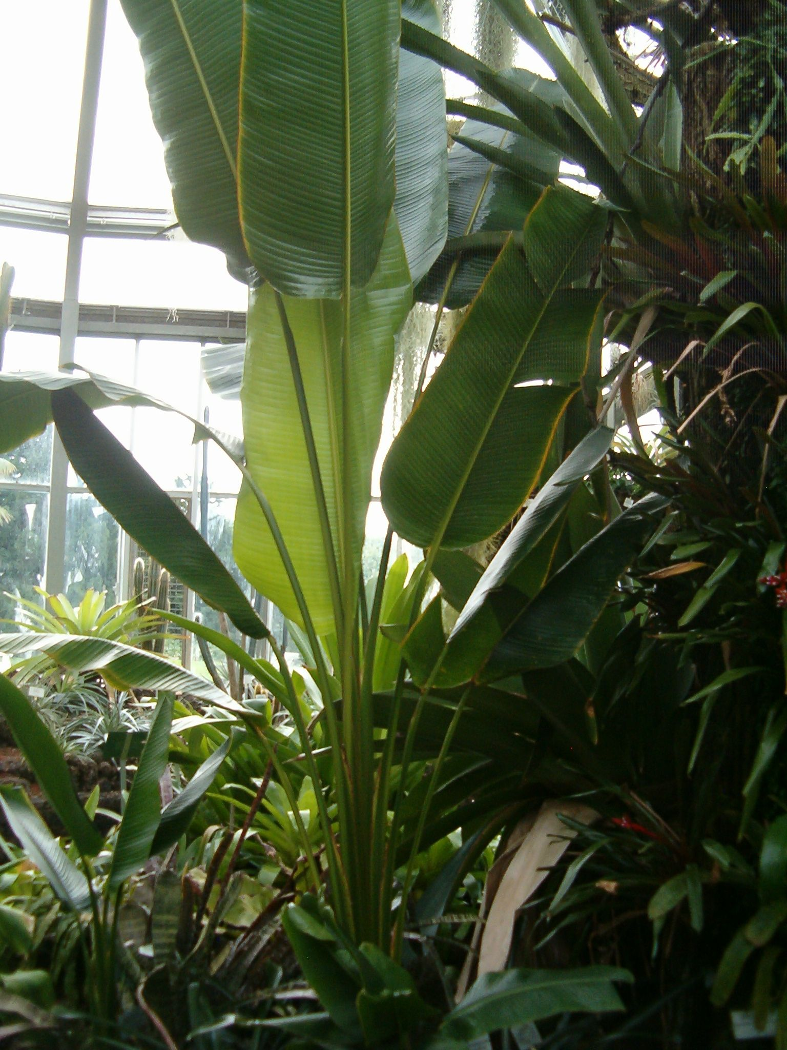 At Botanical Gardens Berlin Dahlem Phenakospermum guyannense